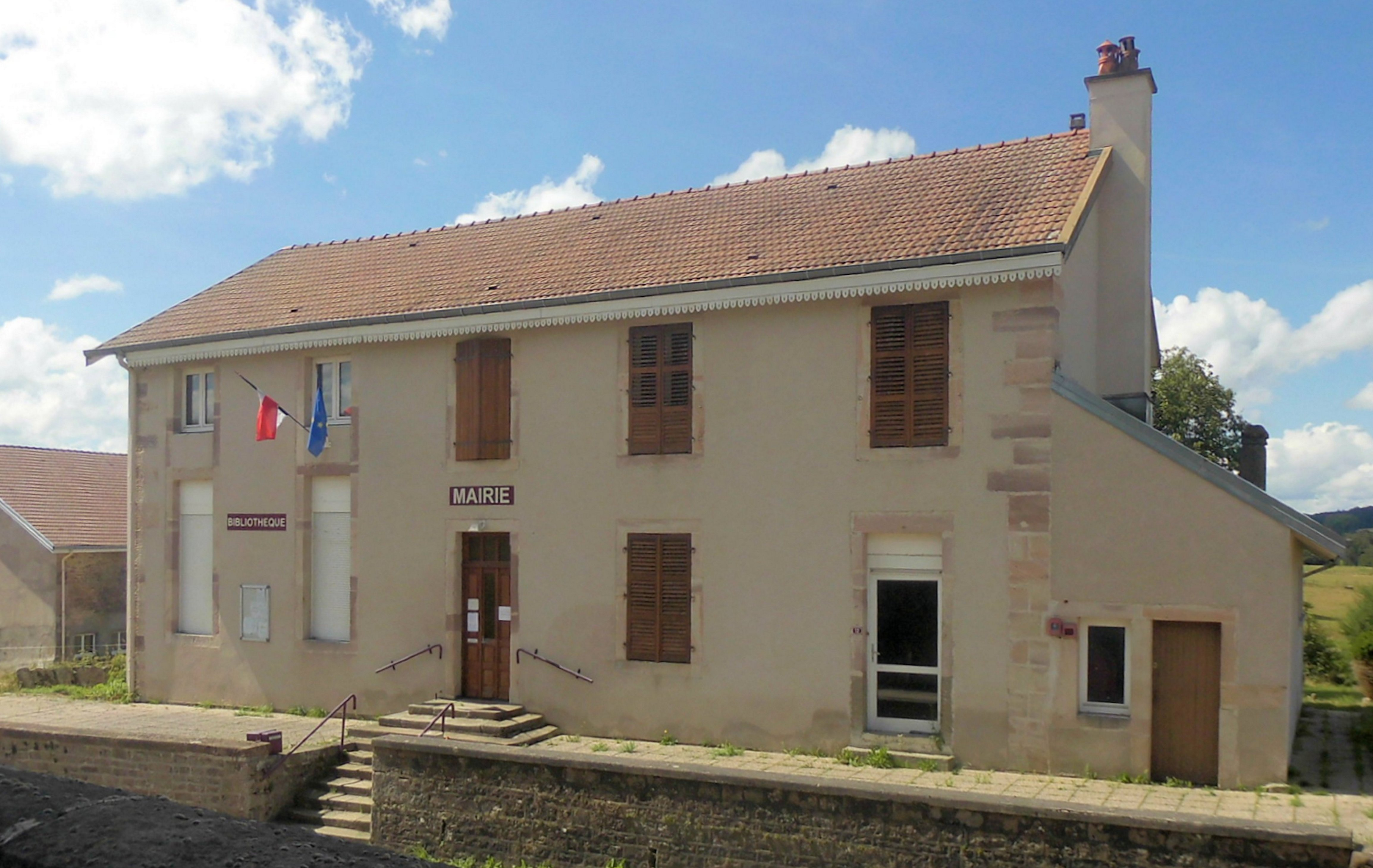 La mairie et la bibliothèquede Charmois-devant-Bruyères